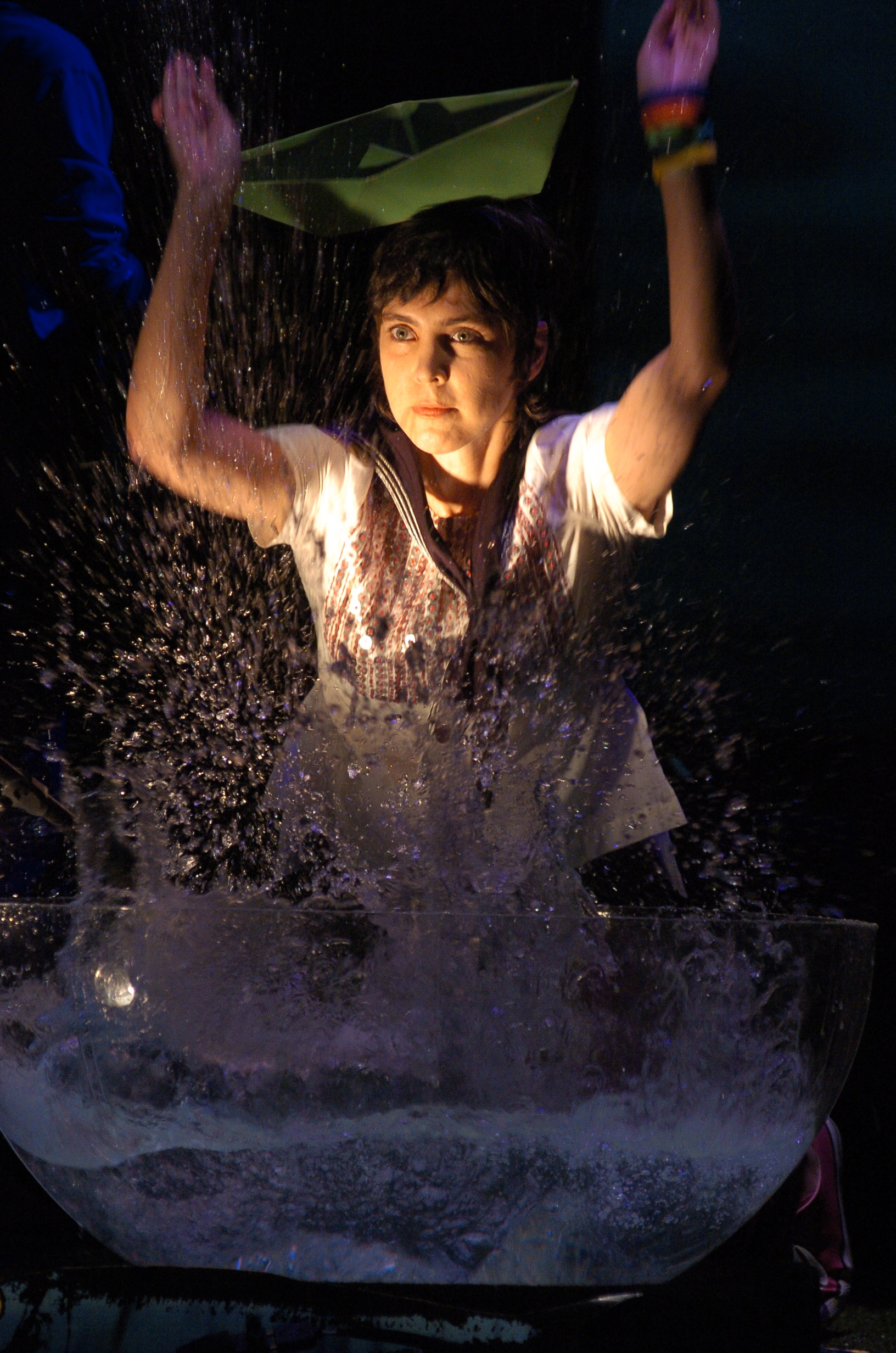 Adriana Calcanhoto no Auditório Ibirapuera. São Paulo. Brasil. Foto: Gerardo Lazzari